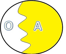 En el mecanismo de la introyección O representa al organismo y A al ambiente, la línea ondulada es el límite de contacto